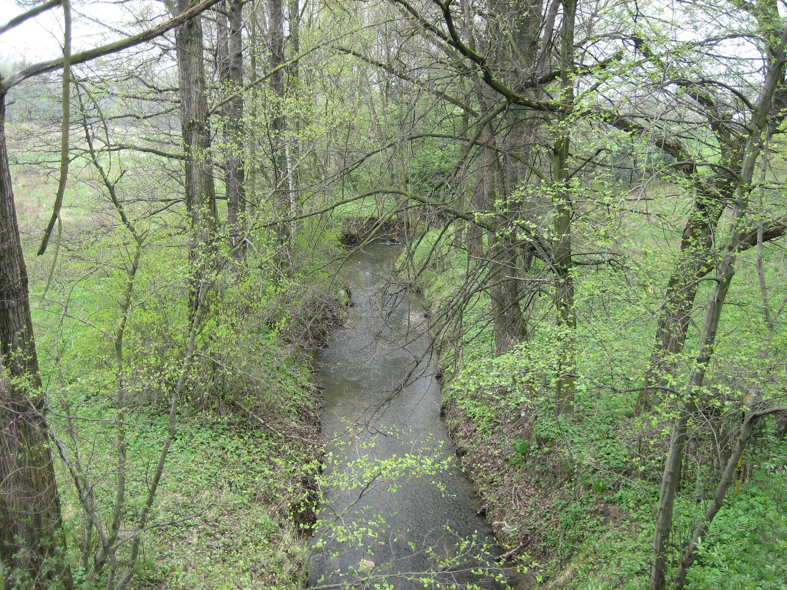 Potok Venclůvka v městě Šenov.